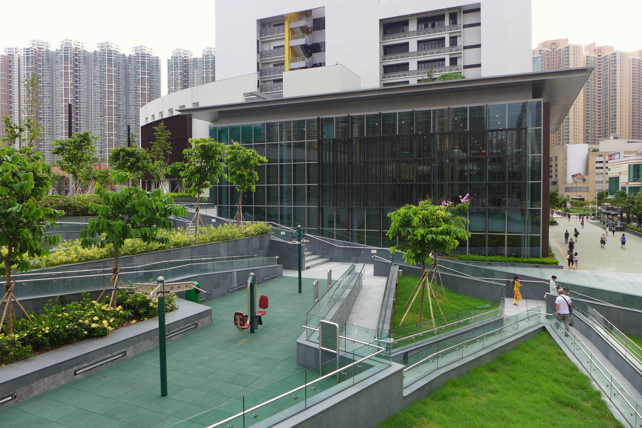 Tiu Keng Leng Public Library